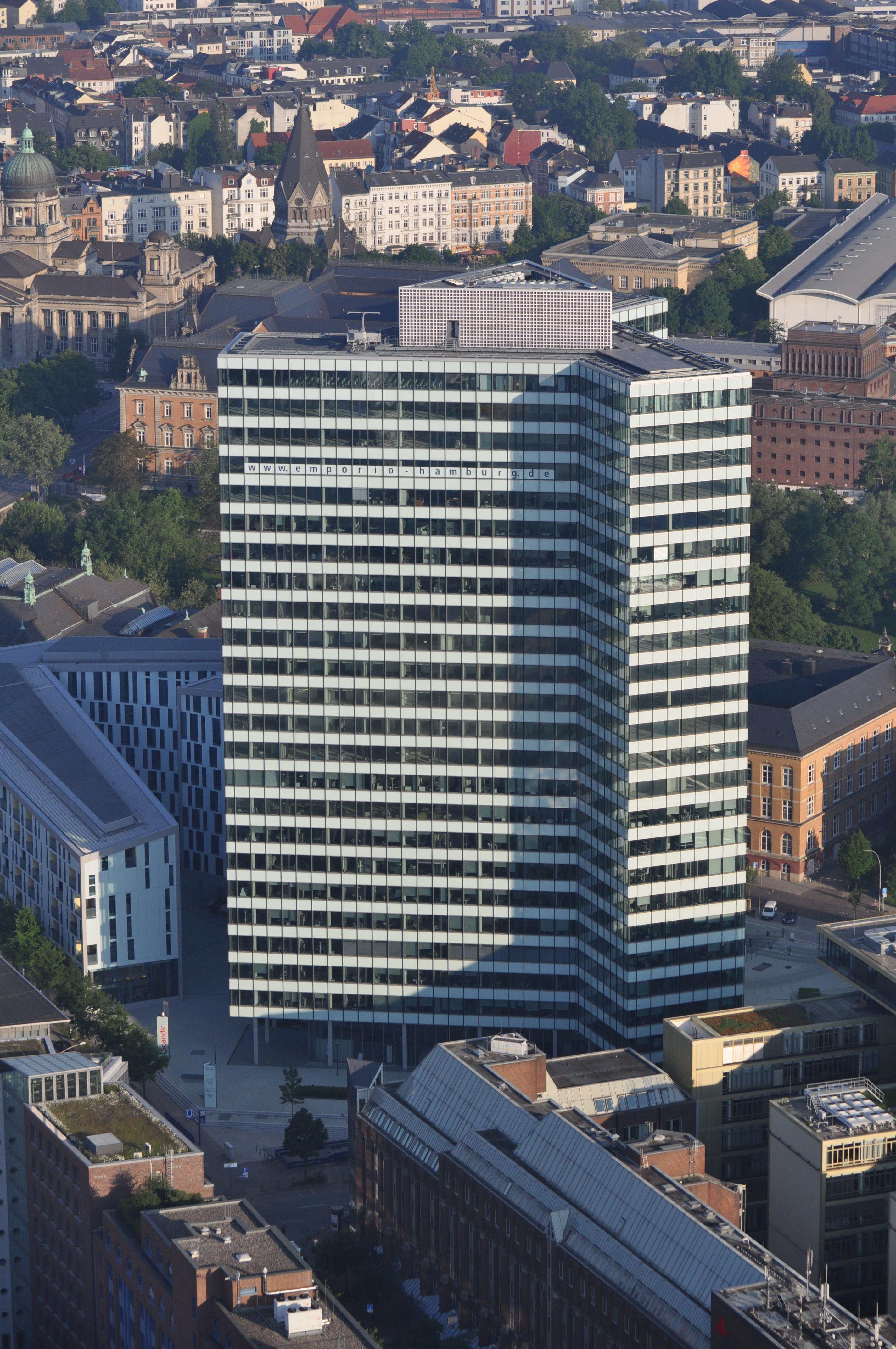 Das Emporiohaus in Hamburg-Neustadt. This is a photograph of an architectural monument.